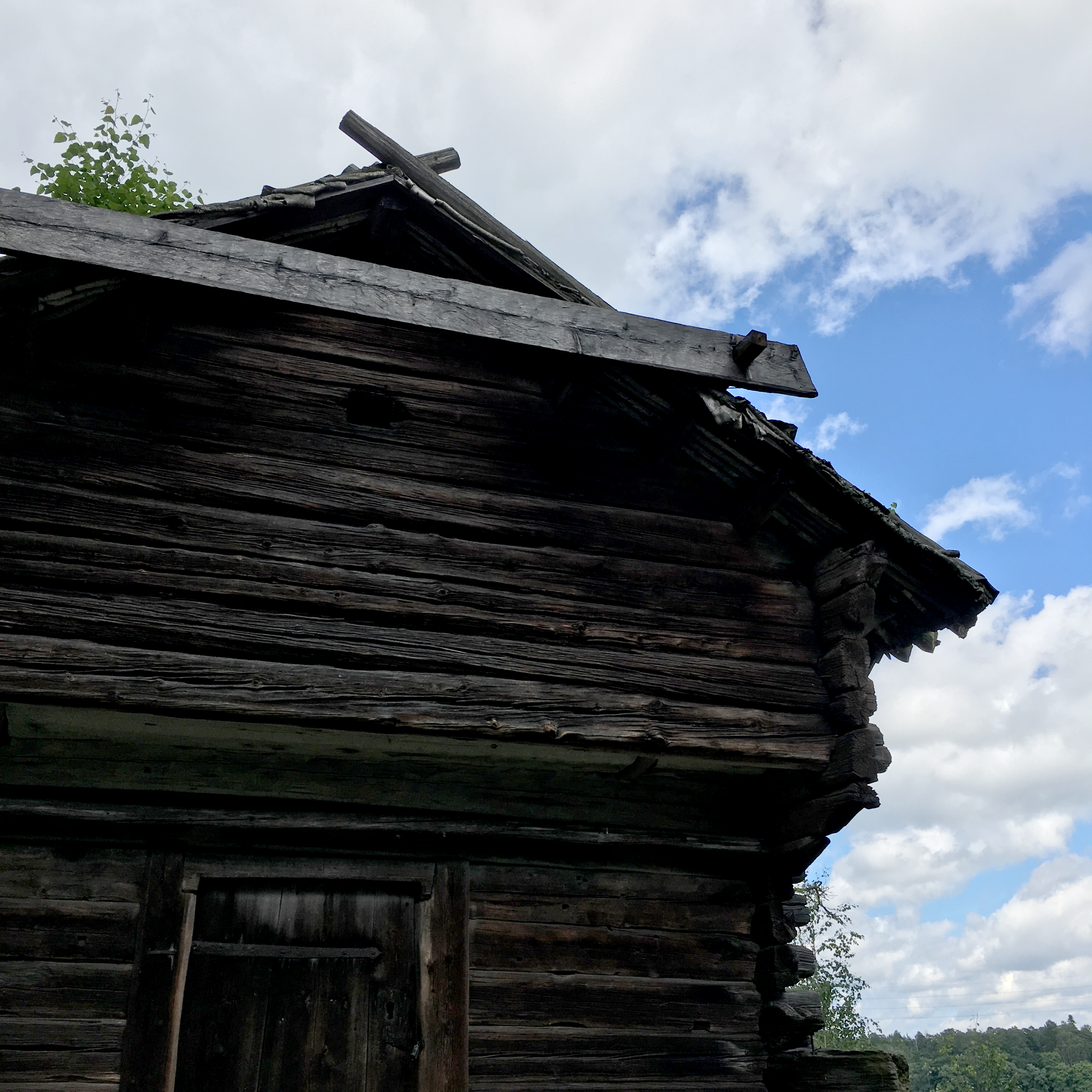 Seurasaari This is a photo of a monument in Finland identified by the ID 'Seurasaari' (Q2165193)